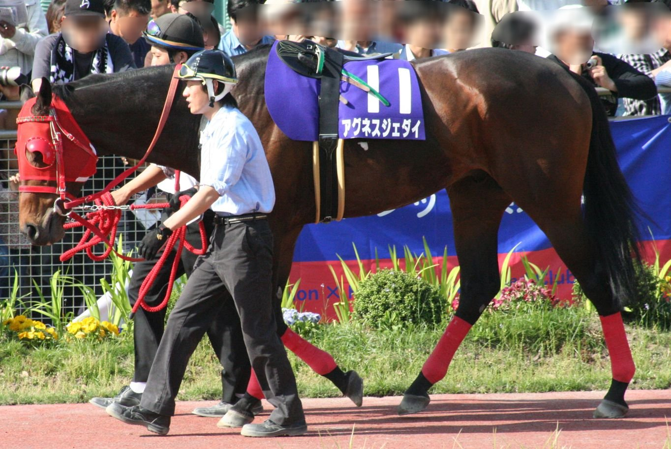 アグネスジェダイ（2008年5月6日 名古屋競馬場）